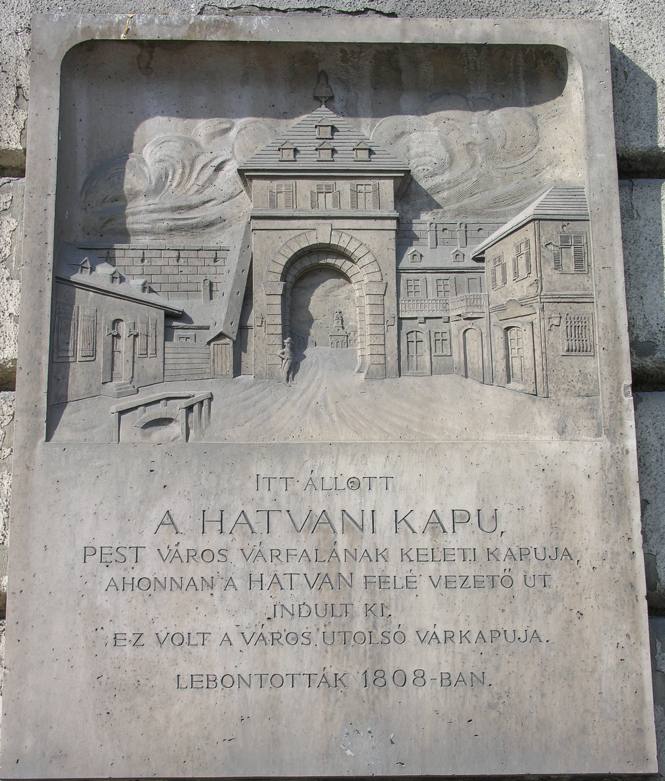 Hatvani kapu emléktábla, Budapest, V., Kossuth Lajos utca 22. Alkotó: Berán Lajos.